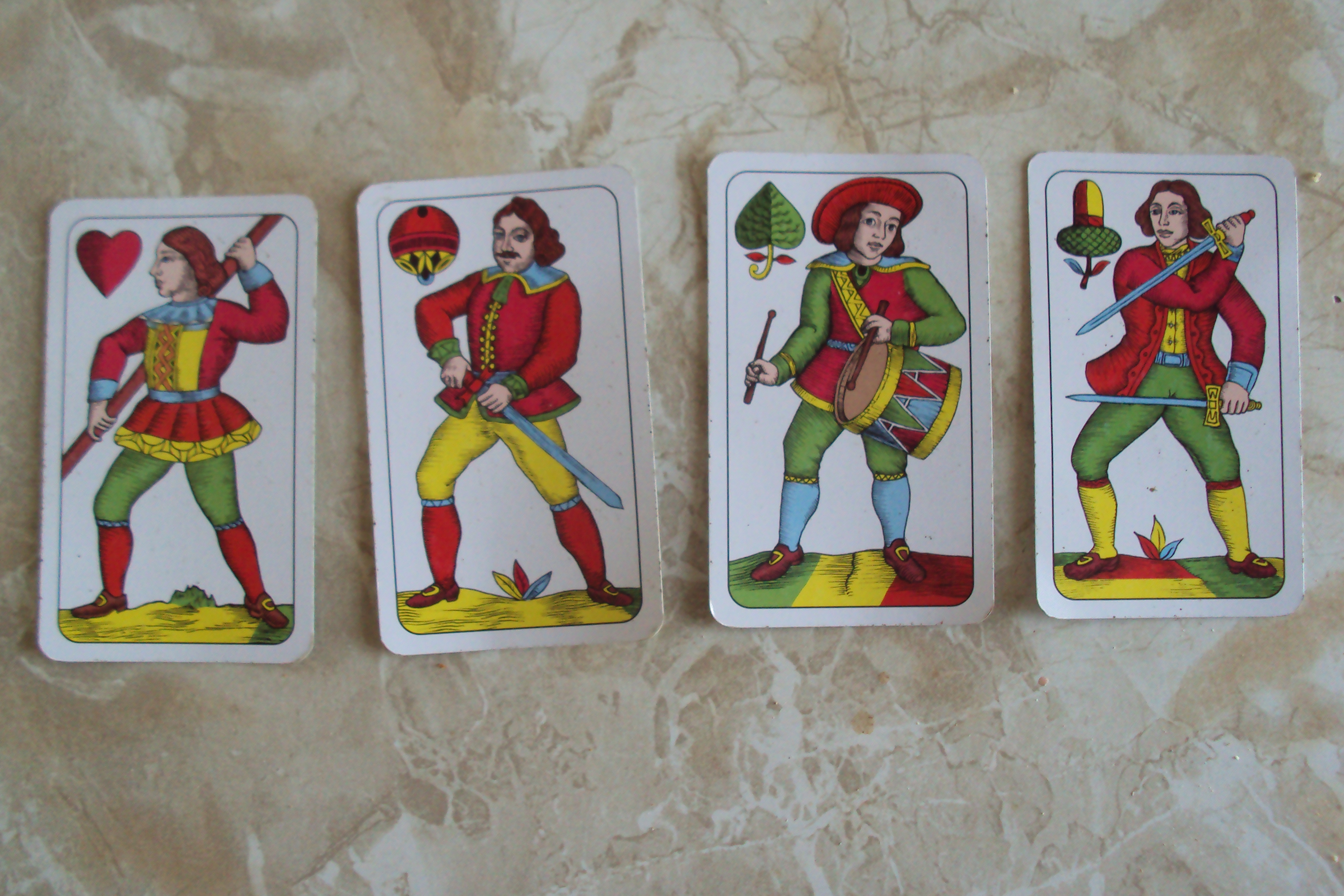 Svršky jednohlavých karet